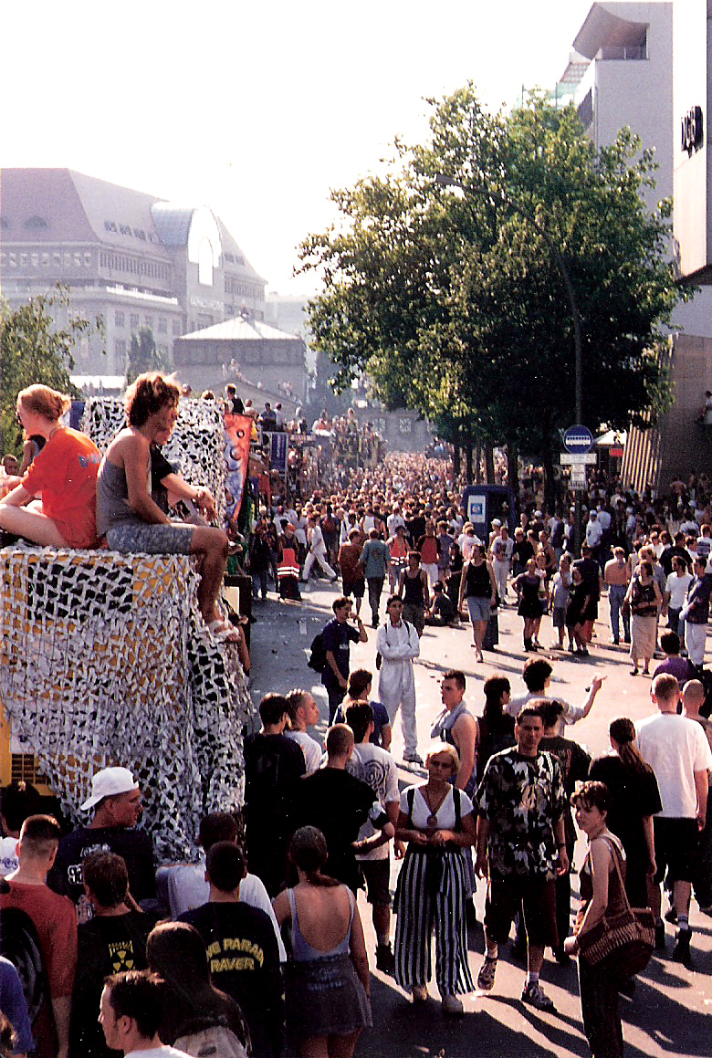 Startpunkt der Loveparade (Wittenbergplatz) mit Abfahrt des Franconia Love Trucks Richtung Ku-Damm